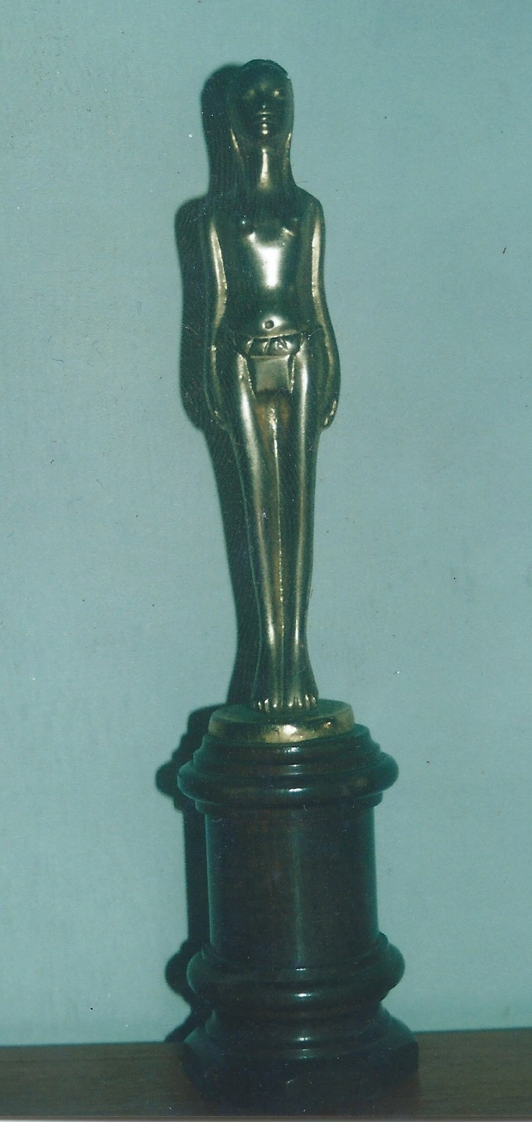 Primera estatuilla en honor a la india Catalina, que luego sirvió en 1974 para erigirle un monumento en Cartagena de Indias.